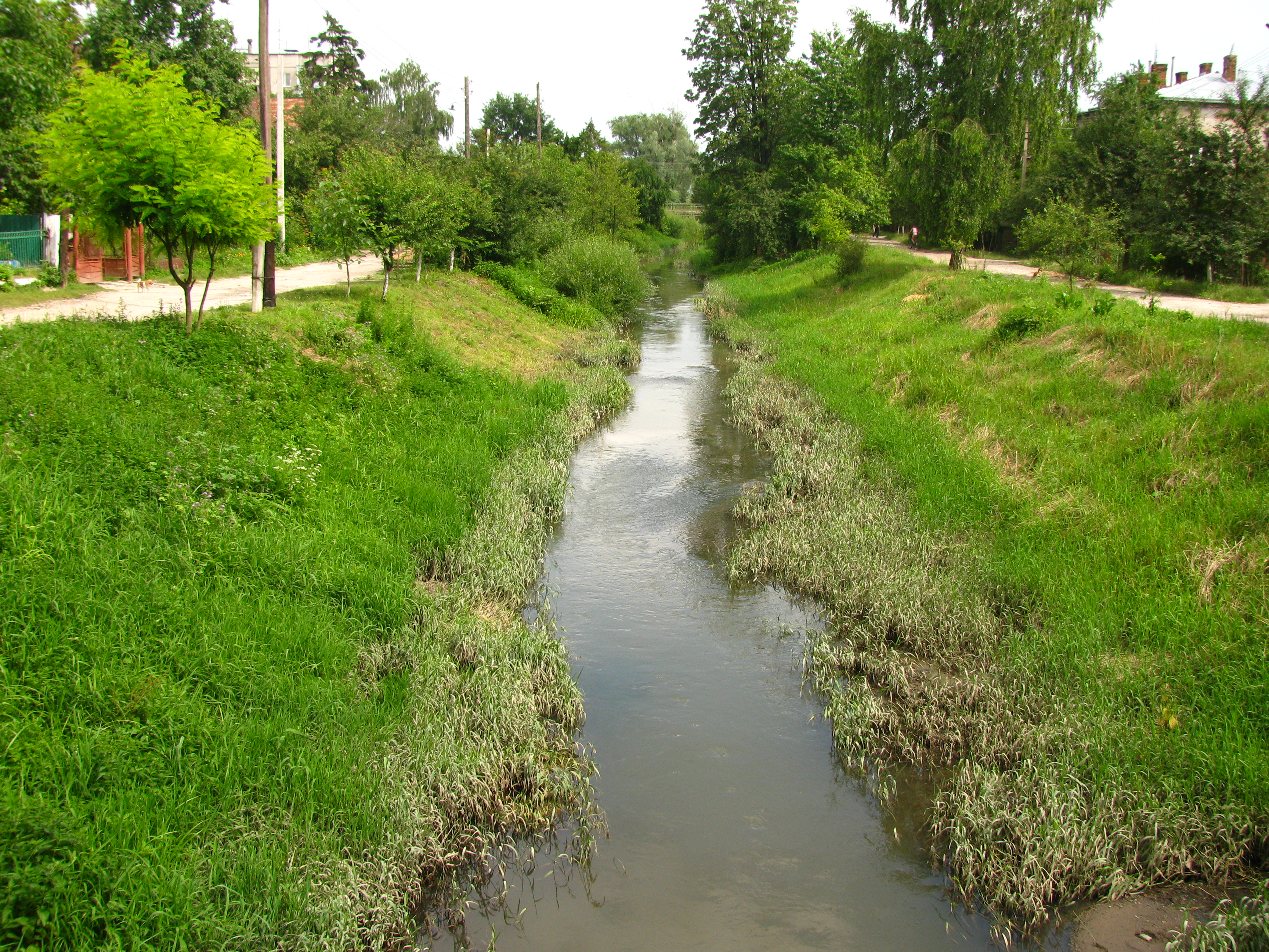 річка Свиня в межах міста Жовква